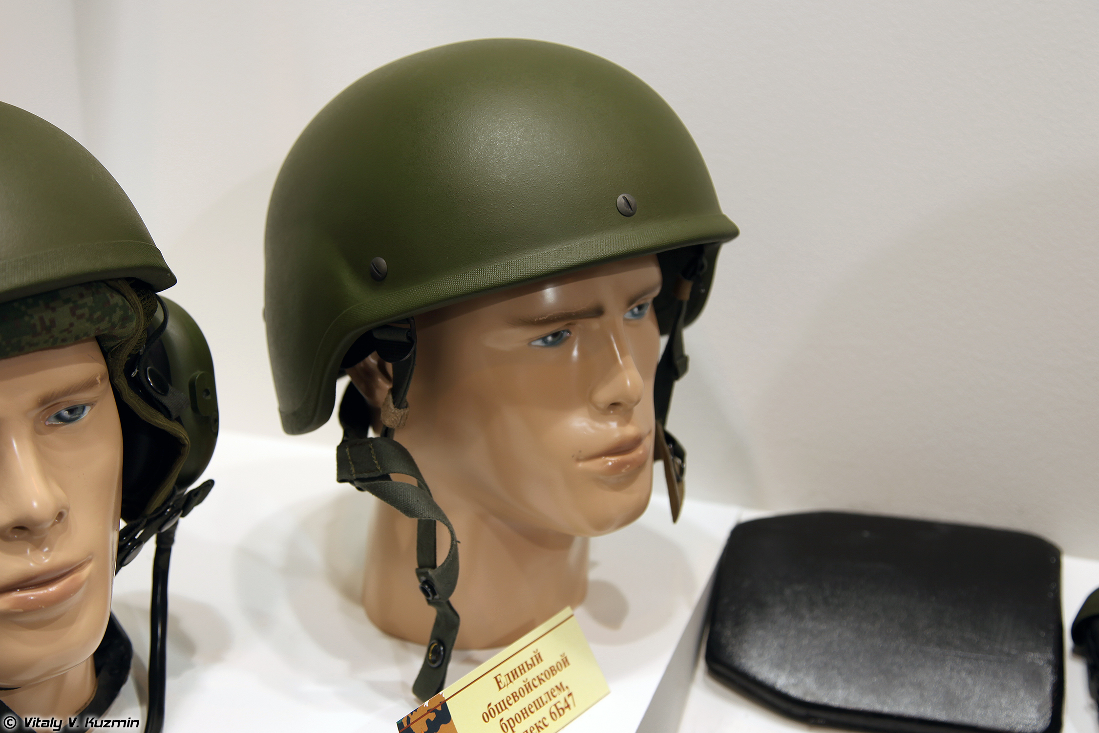 Бронешлем 6Б47 (6B47 helmet)